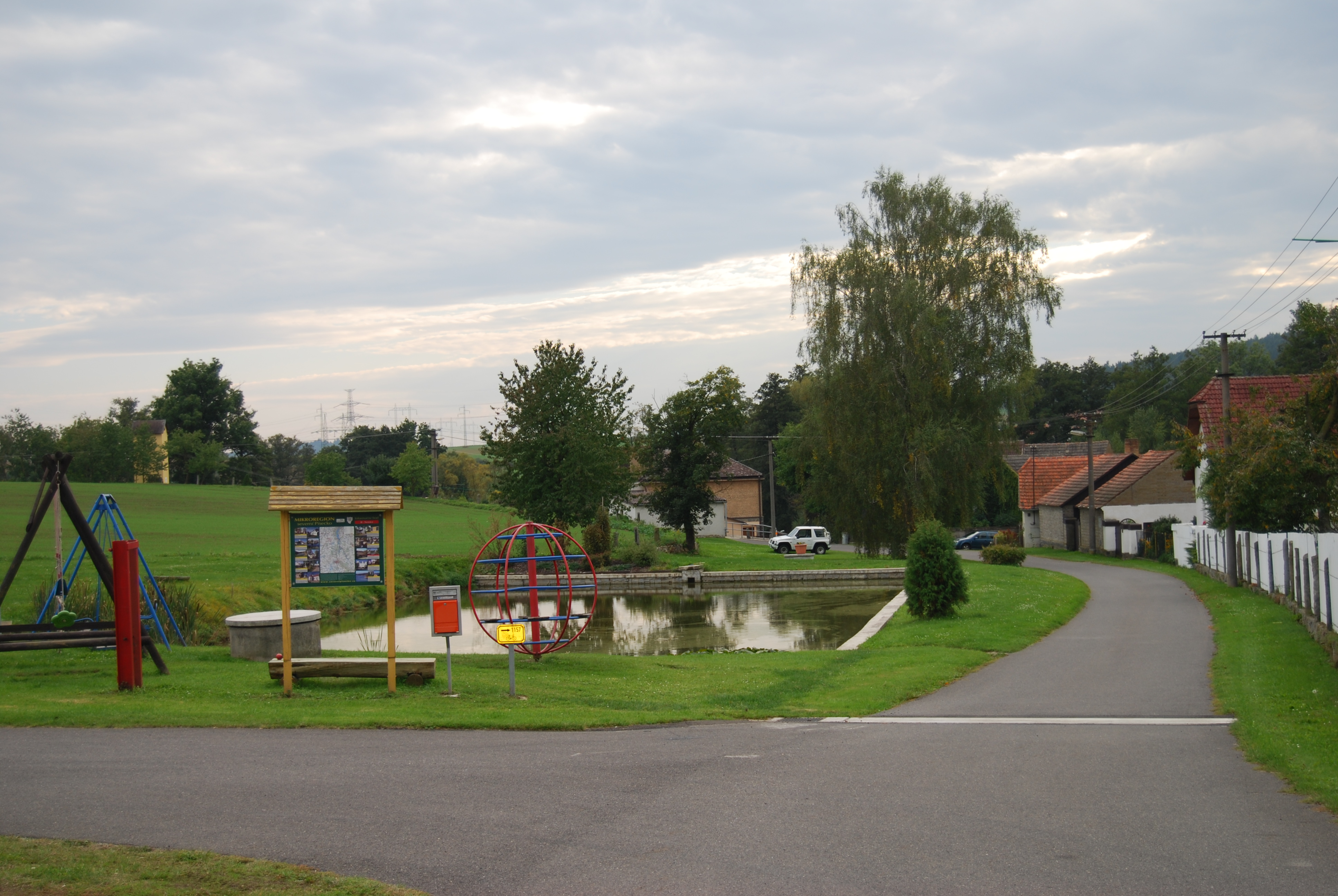 Pohled na část obce. Dolní Nerestce je část obce Nerestce v okrese Písek. Česká republika.